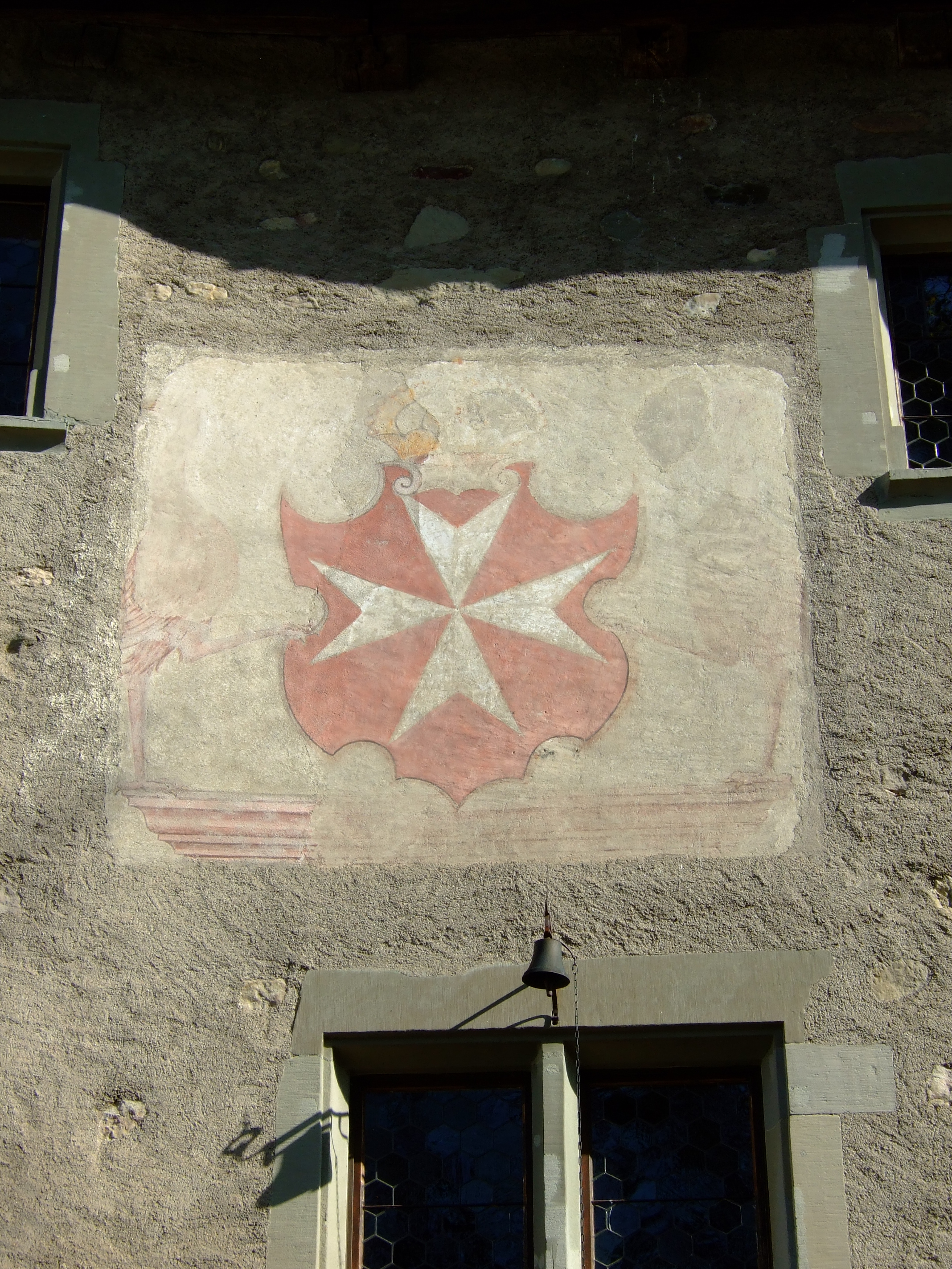 Wappen des Malteserordens an der ehemaligen Kommende Bubikon, Hofseite. Das Wappen ist mit der Fürstenkrone bekrönt und weist zwei Kraniche als Schildhalter auf.